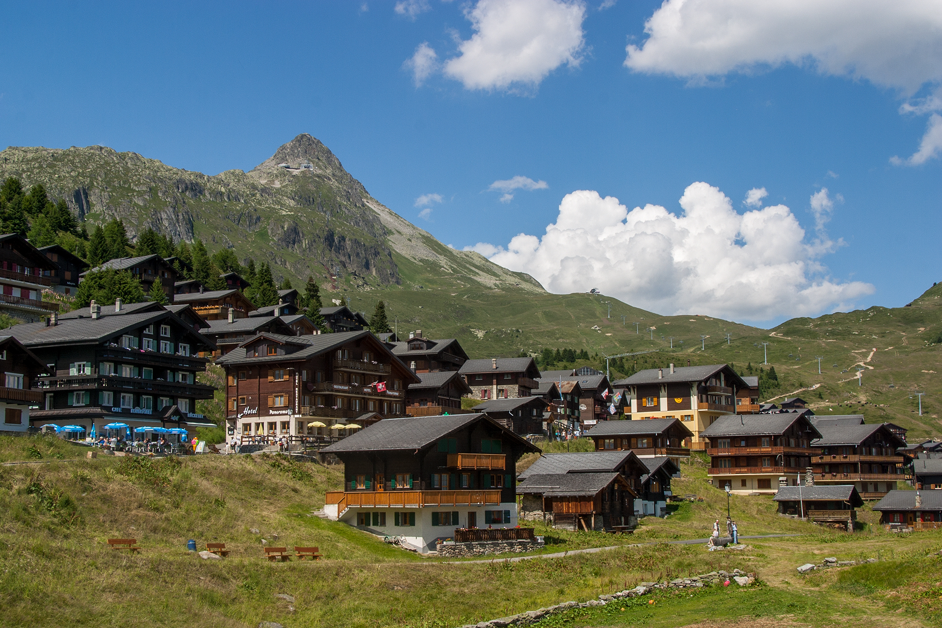 Bettmeralp (VS)